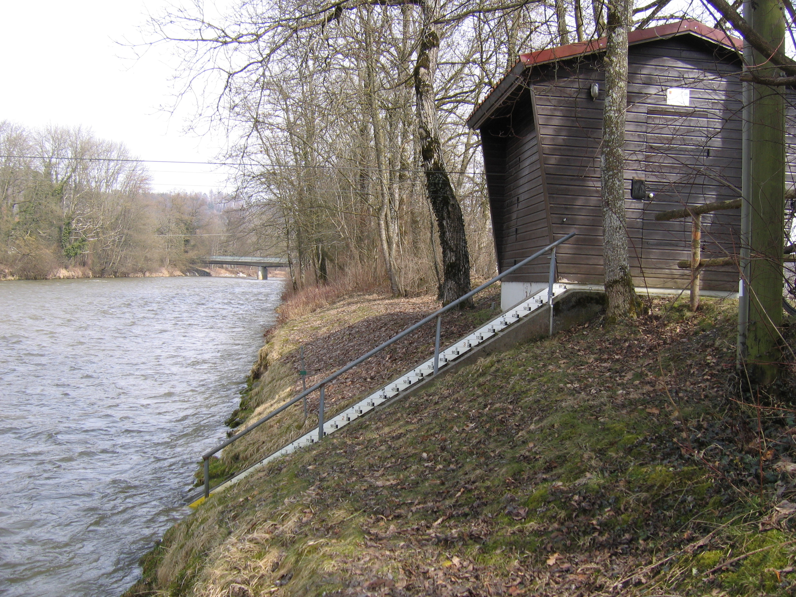 Deutschland - Baden-Württemberg - Bodenseekreis - Kressbronn - Gießenbrücke: Messstation "Pegel Gießen" an der Argen